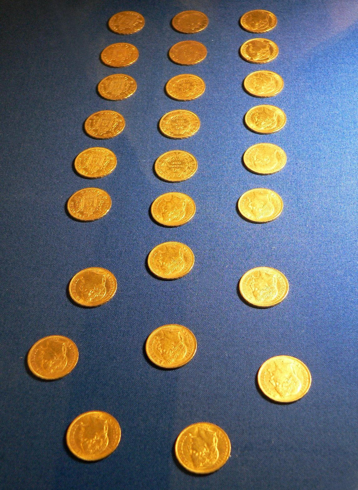 Münzschatz von Lüneburg